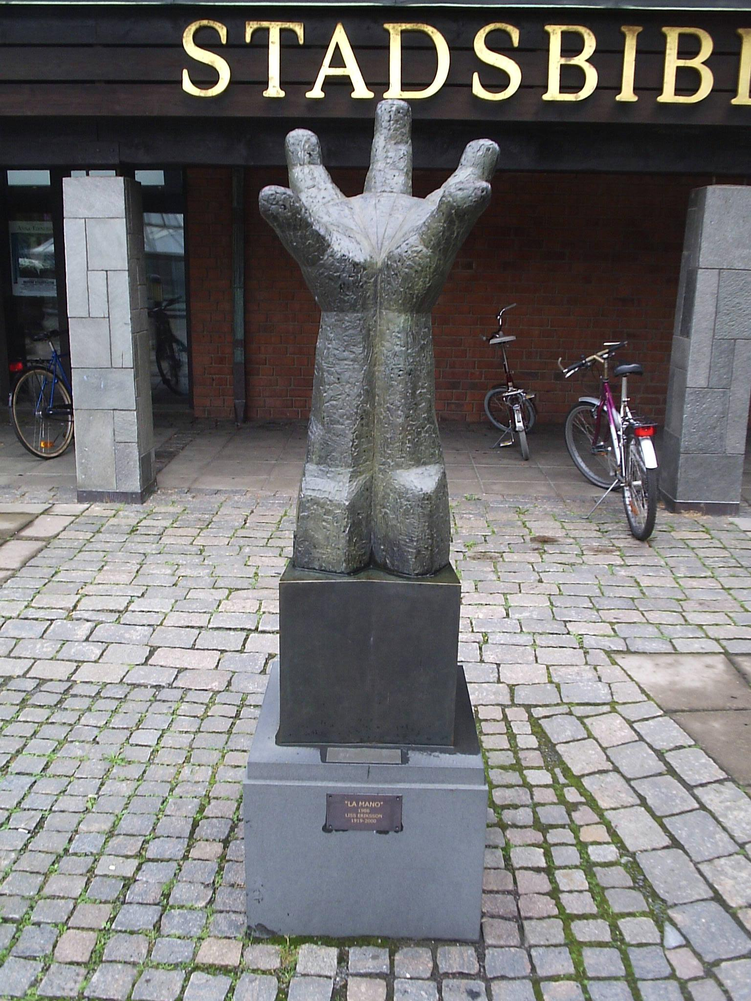 Bilden är fotograferad av Harri Blomberg. Photo by Harri Blomberg.